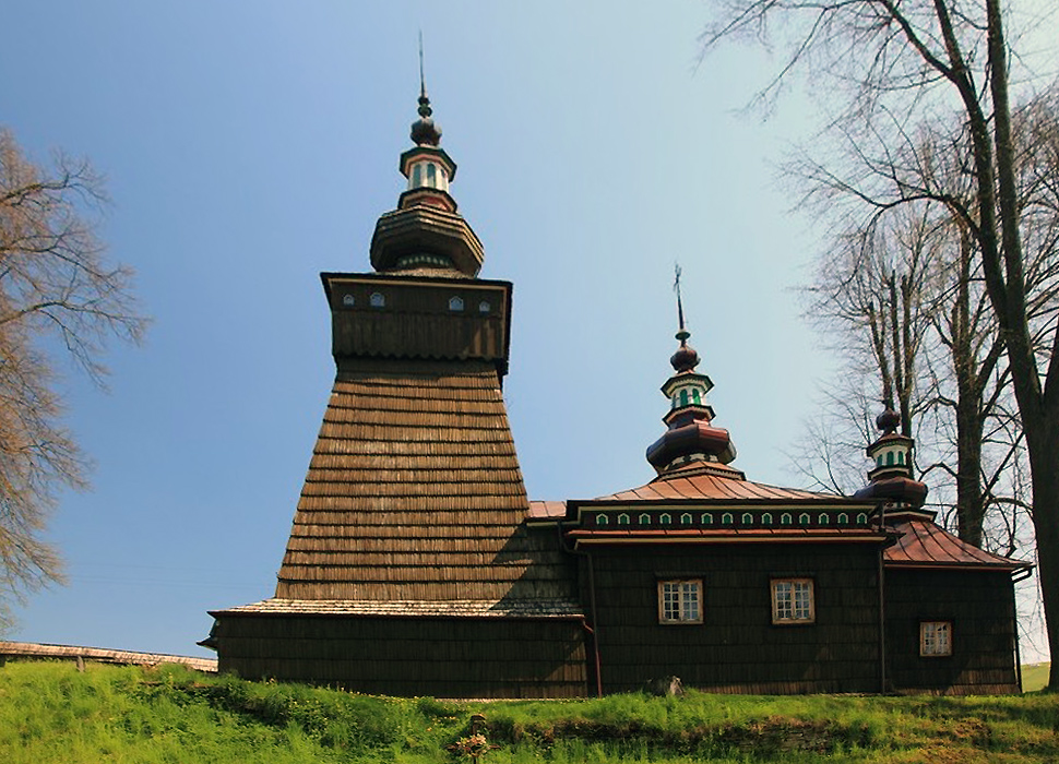 Andrzejówka - województwo małopolskie, w powiat nowosądecki, gmina Muszyna. Zabytkowy kościół, dawna cerkiew z XIX wieku.